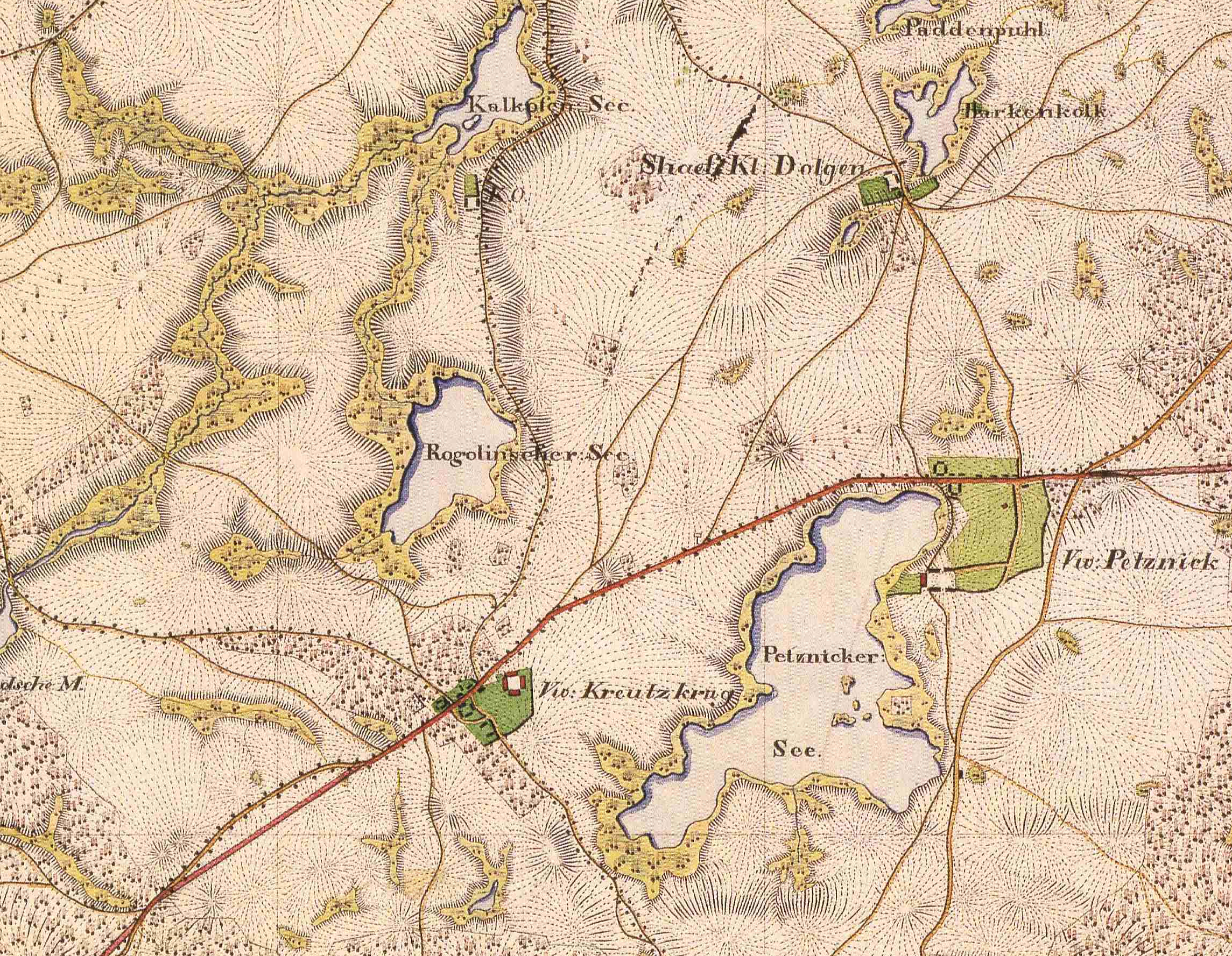 Petznick, Kreuzkrug, Kalkofen (abgeg.), Klein Dolgen (abgeg.), Ortsteil Petznick, Stadt Templin, Lkr. Uckermark, Brandenburg, Ausschnitt aus dem Urmesstischblatt 2847 Templin von 1825